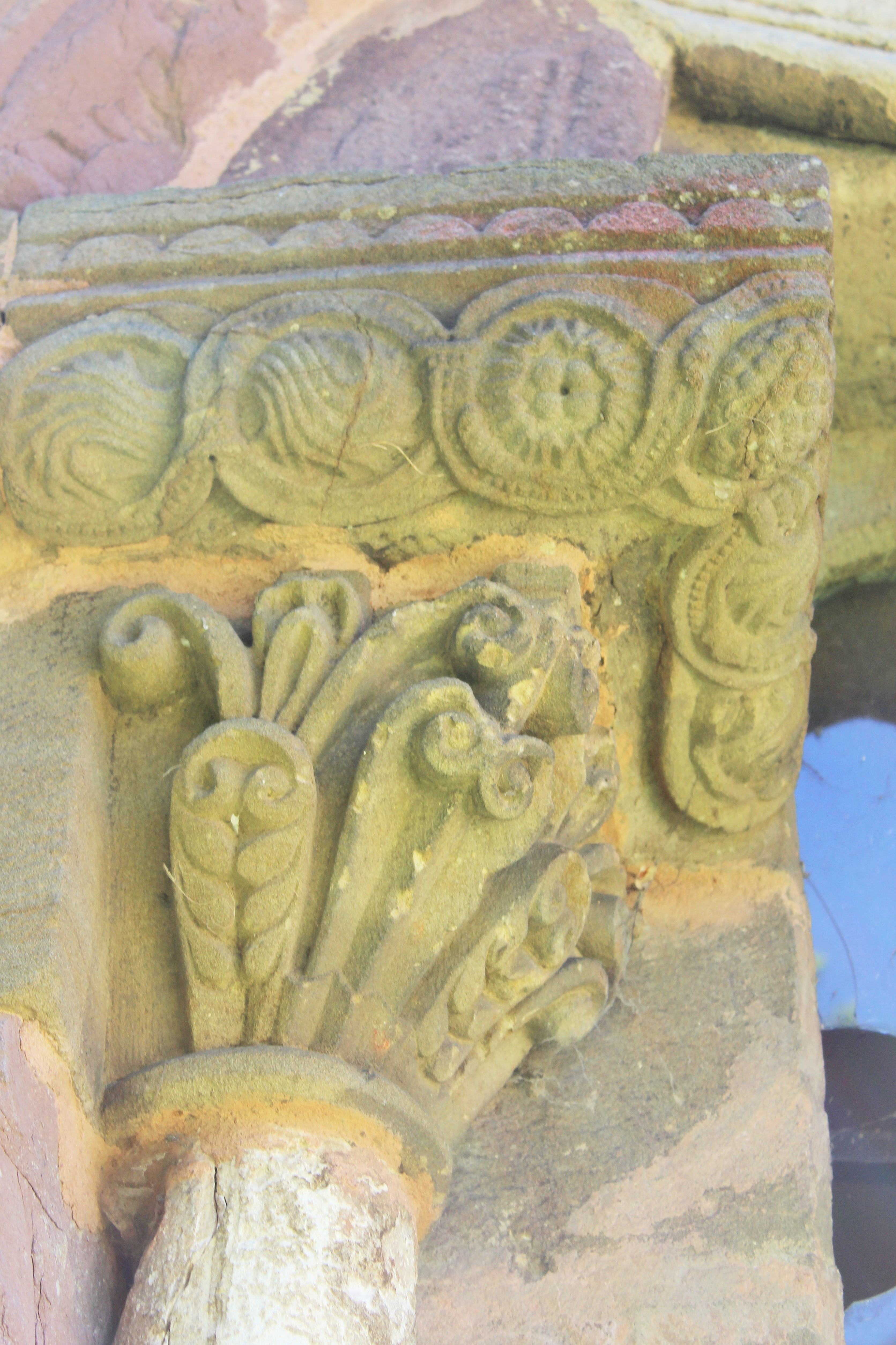 Capitel del ábside, zona izquierda